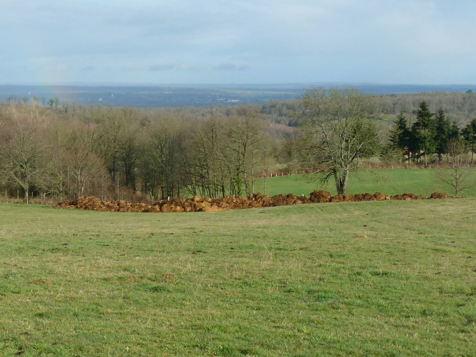 vue vers le nord depuis la petite route du Mas à Mazerolles, Charente, France